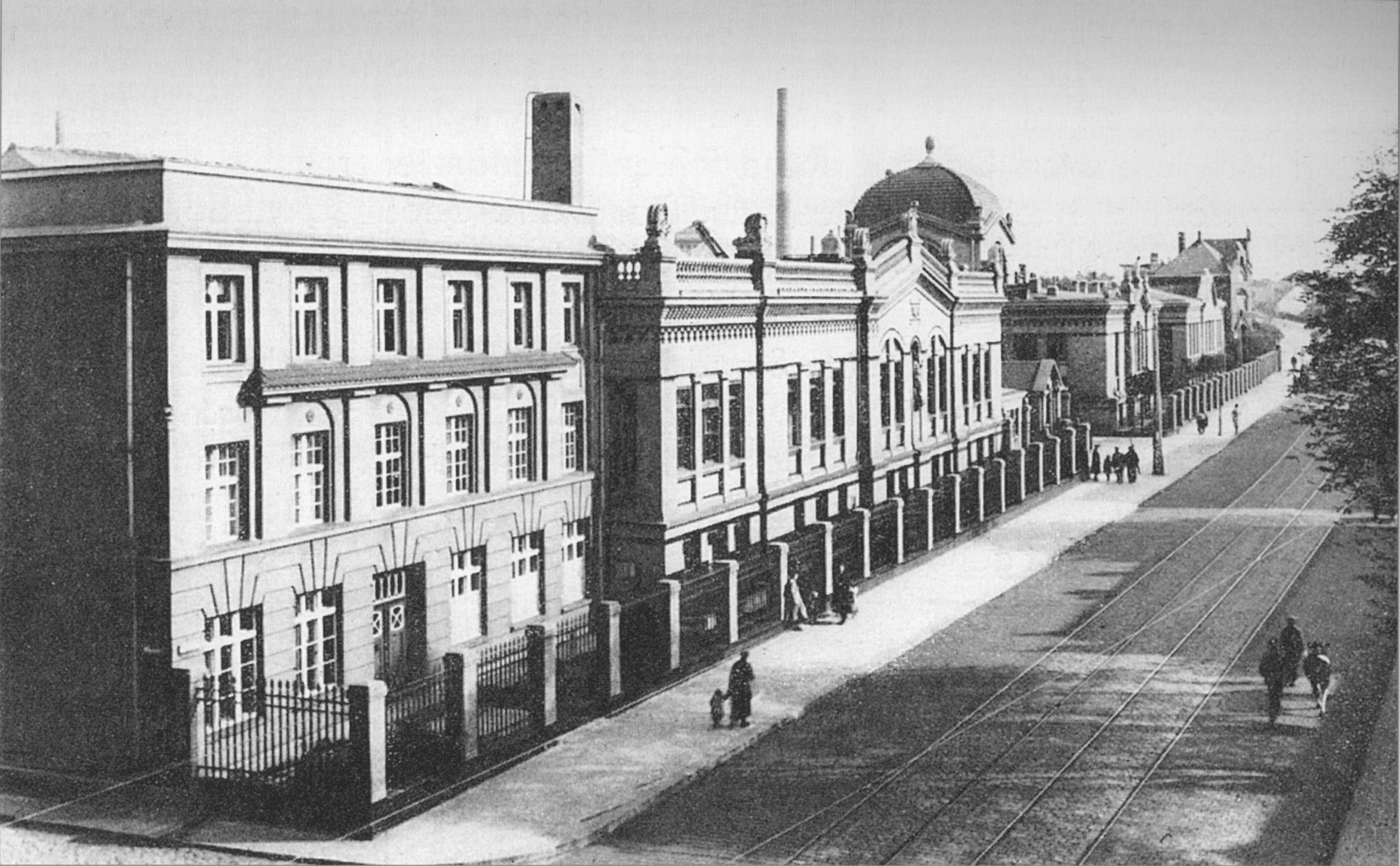 Blick auf die Verwaltungs- und Laborgebäude von Falhlberg-List